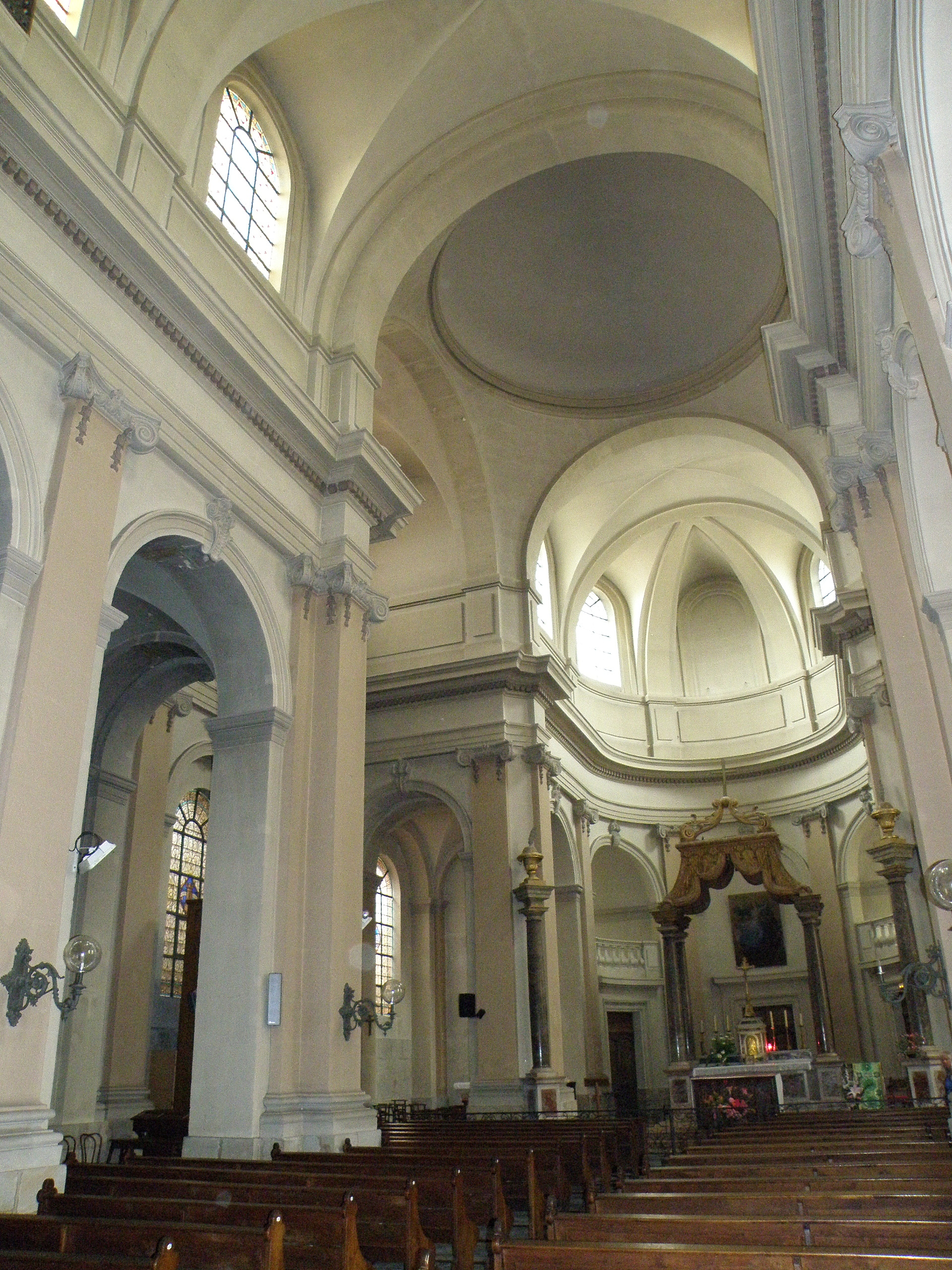 Autun (Saône-et-Loire, Bourgogne, France). Église Notre-Dame-de-l'Assomption, anciennement intégrée au lycée Bonaparte.